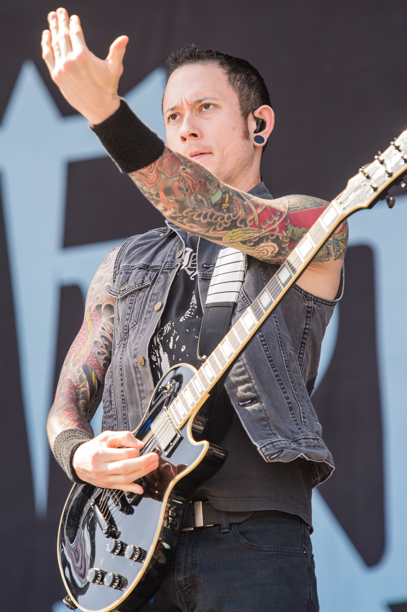 ARGO-Konzerte,Centerstage,Konzert,Livekonzert,Livemusik,Matthew Heafy,Musik,RiP,Rock im Park 2014,Trivium